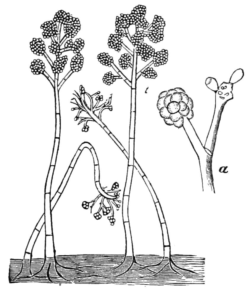 Peziza fucheliana